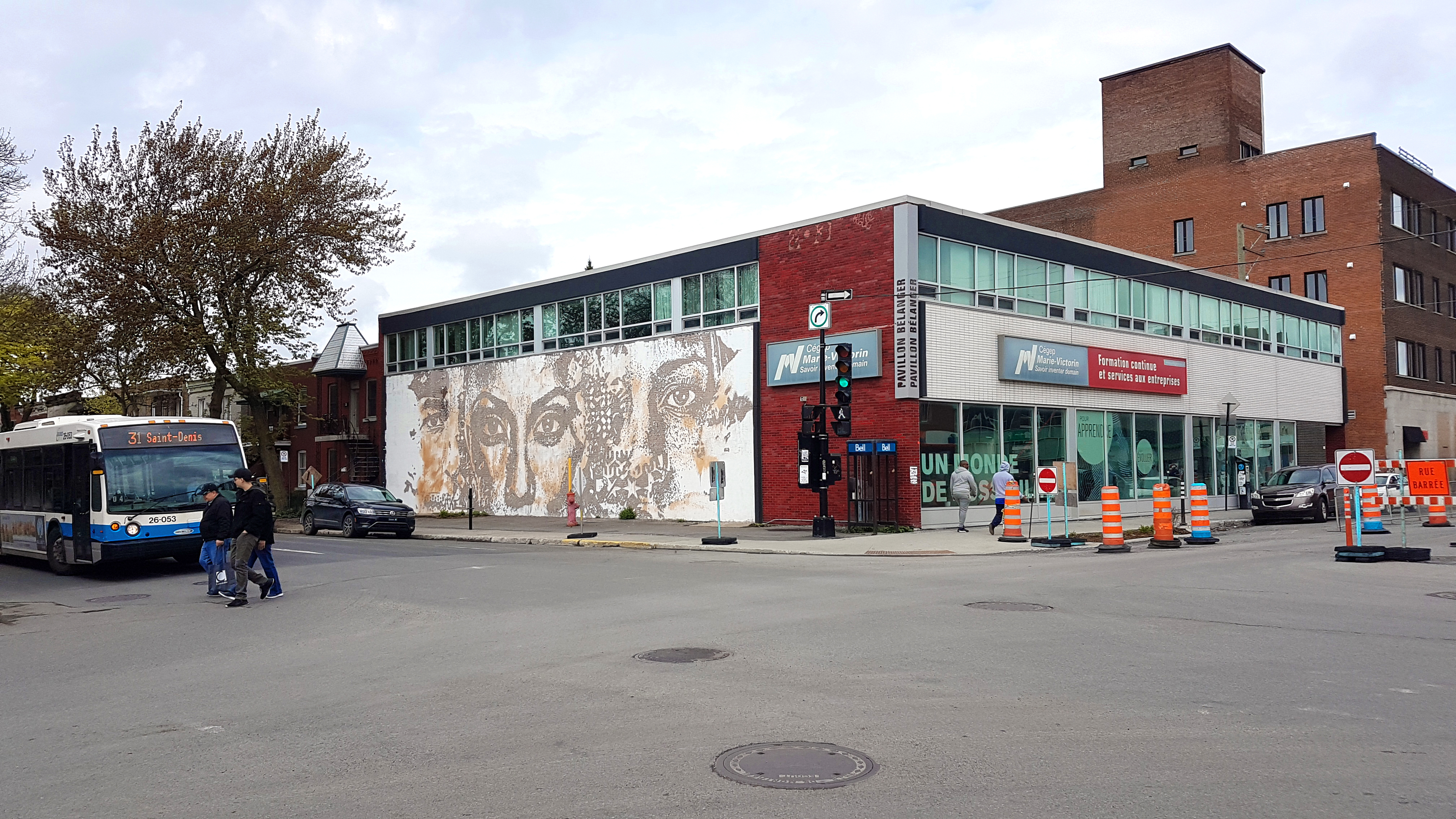 Coin de l'avenue de Chateaubriand et de la rue Bélanger, Montréal, 19 mai 2019. Pavillon Bélanger du Cégep Marie-Victorin au 767 rue Bélanger. Murale du 767 rue Bélanger, façade avenue de Chateaubriand, réalisée en 2017 par VHILS (Alexandro Farto). Corner of Avenue de Chateaubriand and Bélanger Street, in Montreal, 19 May 2019. Pavillon Bélanger of Cégep Marie-Victorin at 767, Bélanger Street. Mural on the building painted by artist VHILS (Alexandro Farto) in 2017.